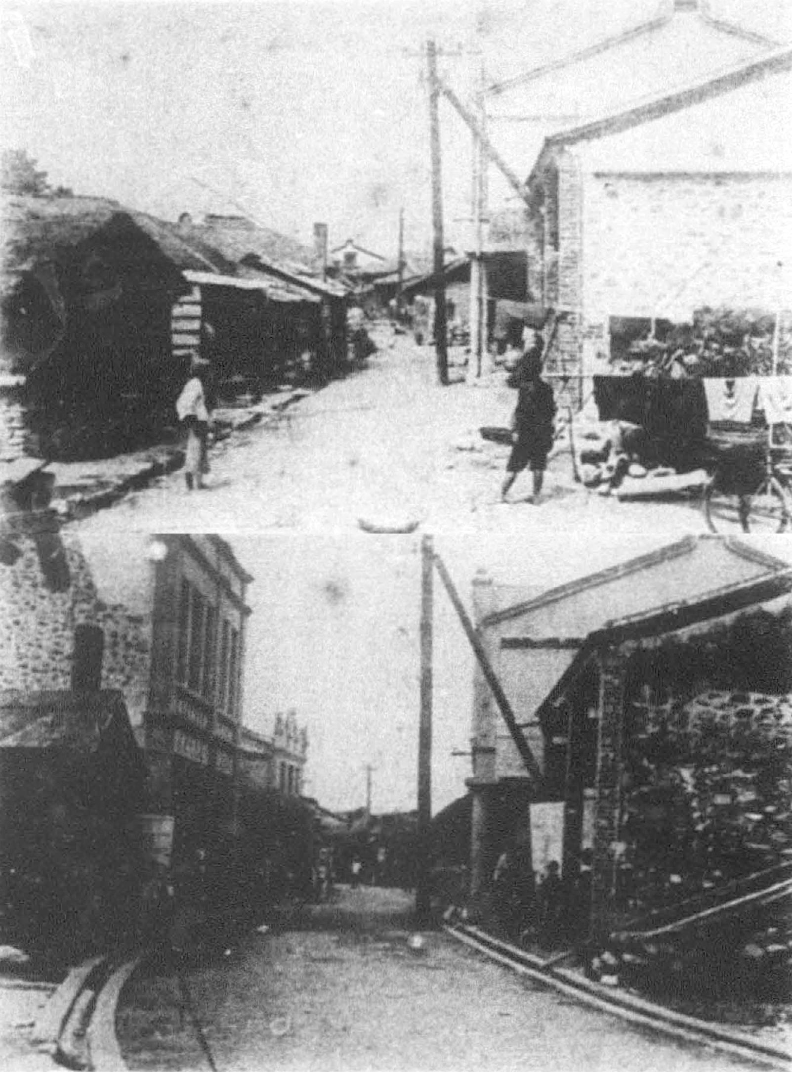 中文（台灣）: 上圖為1931年3月市接整理前的樣貌，下圖為同一地點在整理後的樣貌。